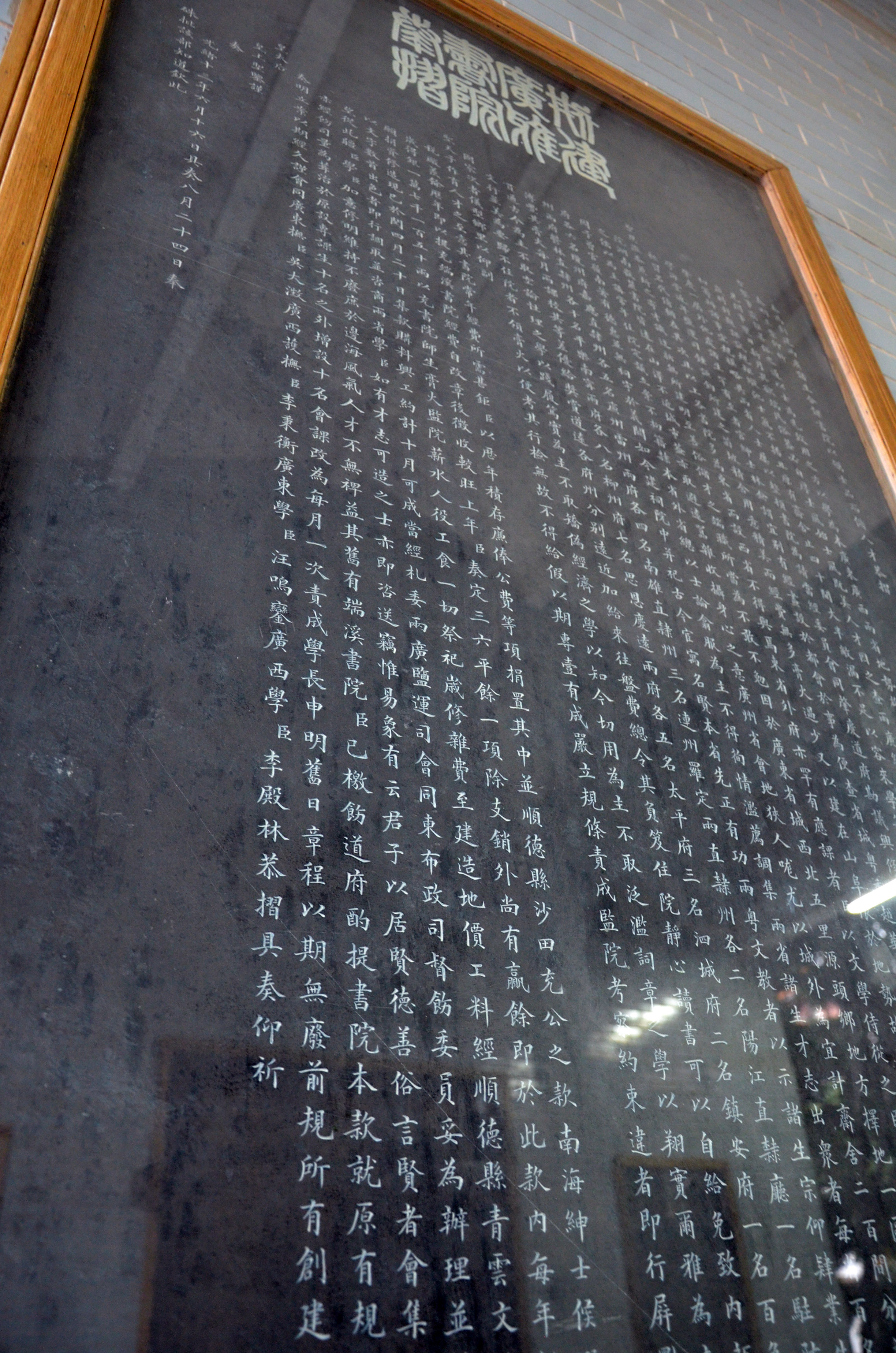 張之洞的《創建廣雅書院奏摺》石刻板，現存於廣東廣雅中學山長樓。《創建廣雅書院奏摺》奏於光緒十三年六月十六日（西元1887年）